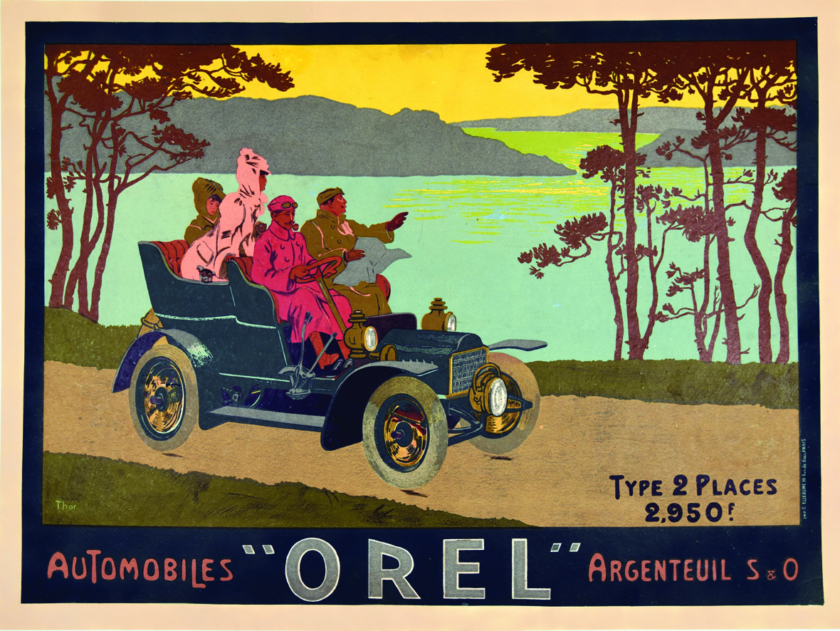 AUTOMOBILES "OREL" ARGENTEUIL S & O. Lithographie en couleurs. Imp. G. Elleaume, Paris. Entoilée